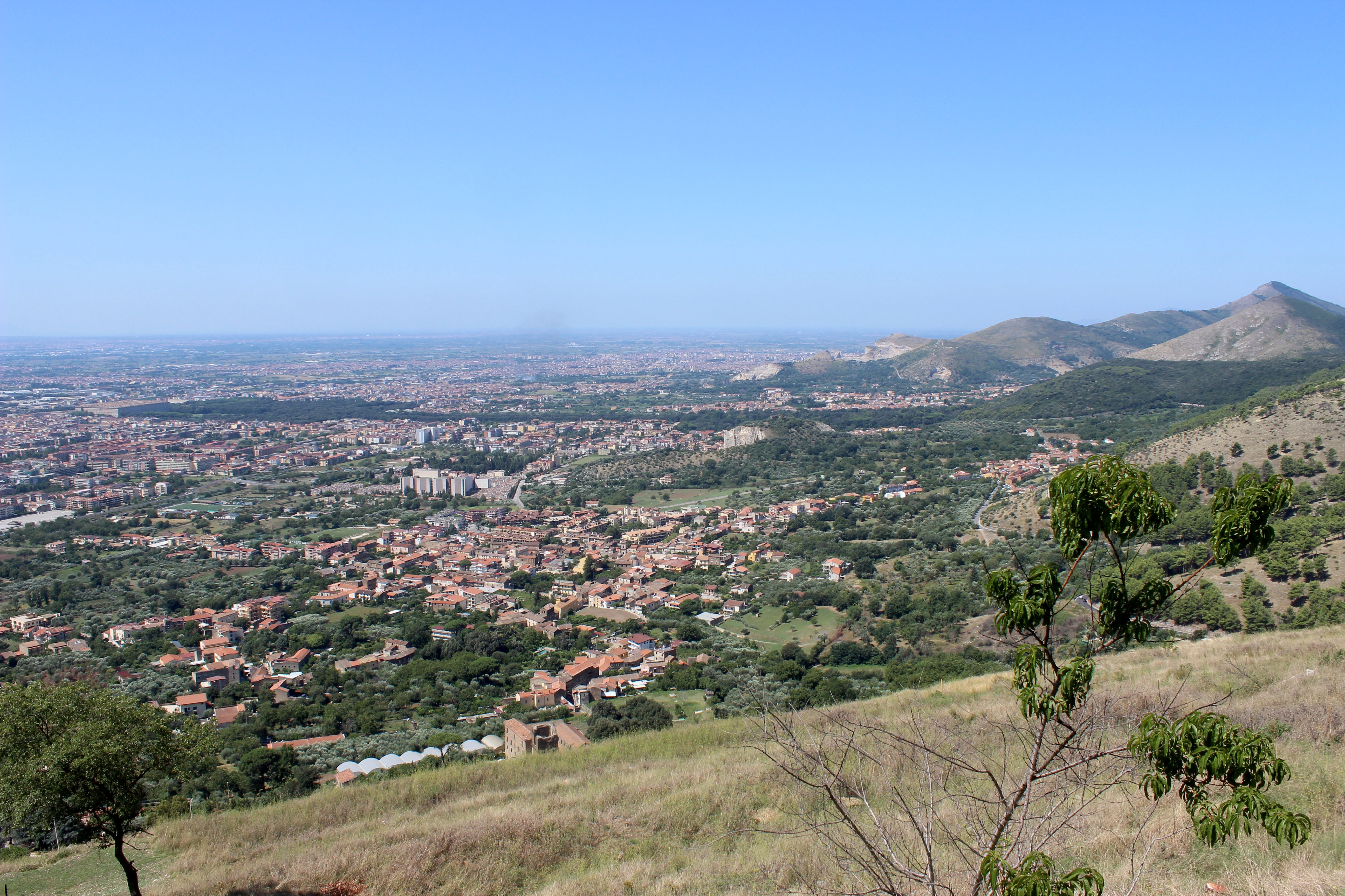 Caserta desde Casertavecchia.